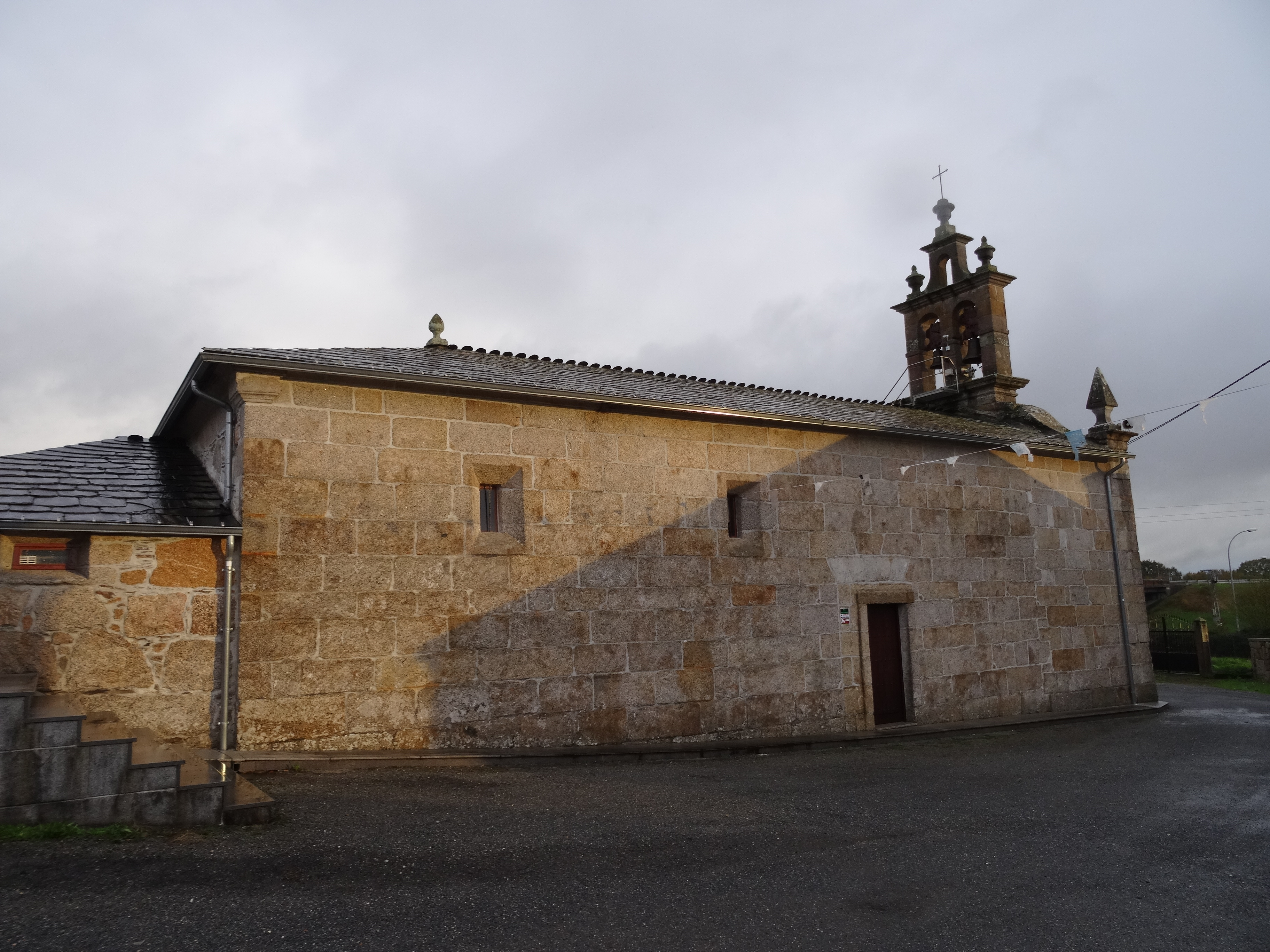 Igrexa parroquial de Pías, concello de Lugo.